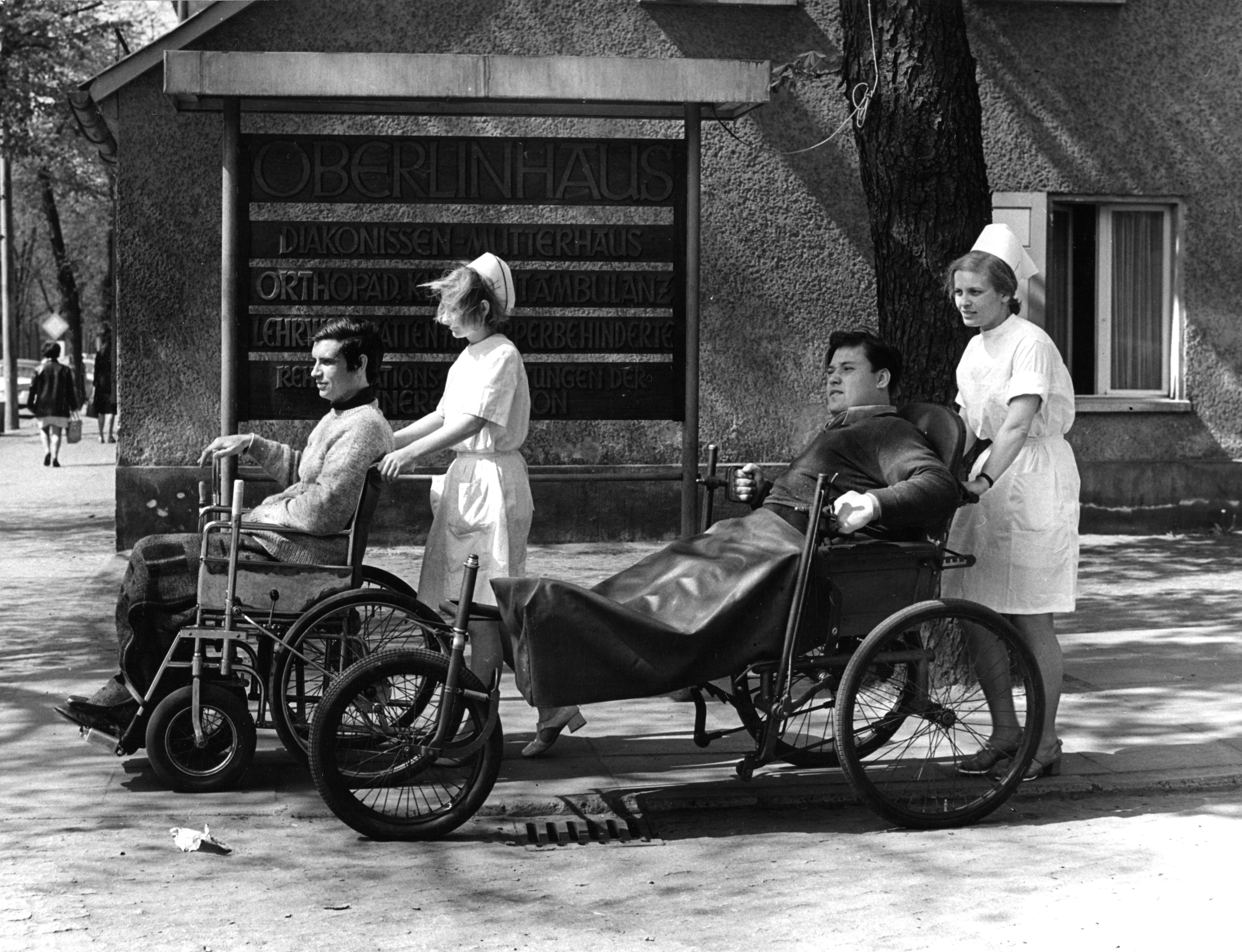 Oberlinhaus: Fortgang der Arbeit in der DDR - Schwestern schieben Rollstuhl